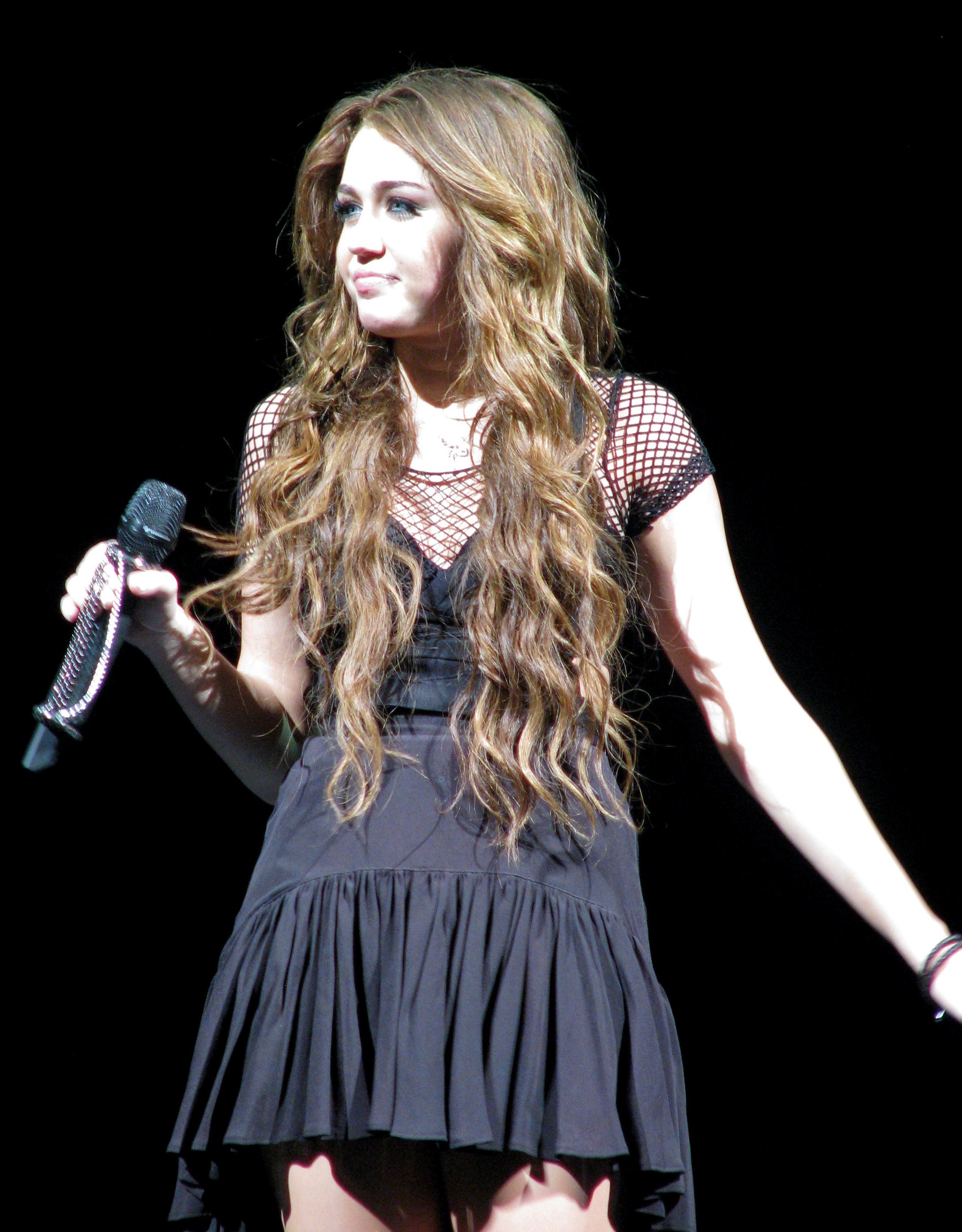 A teen singing.